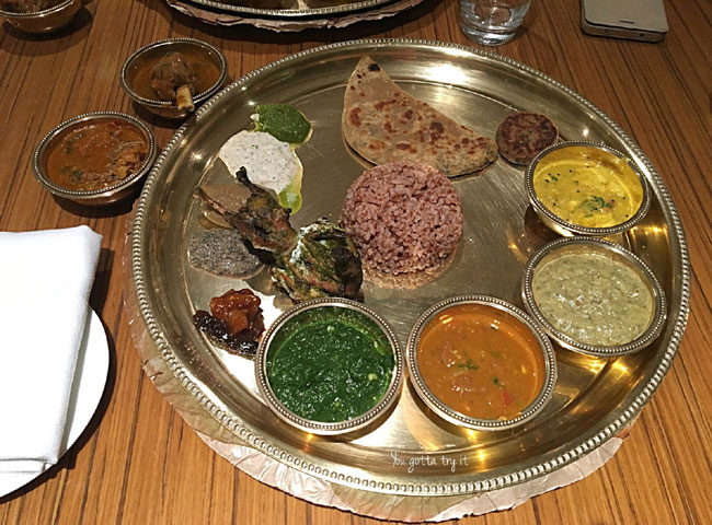 उत्तराखंड के व्यंजन